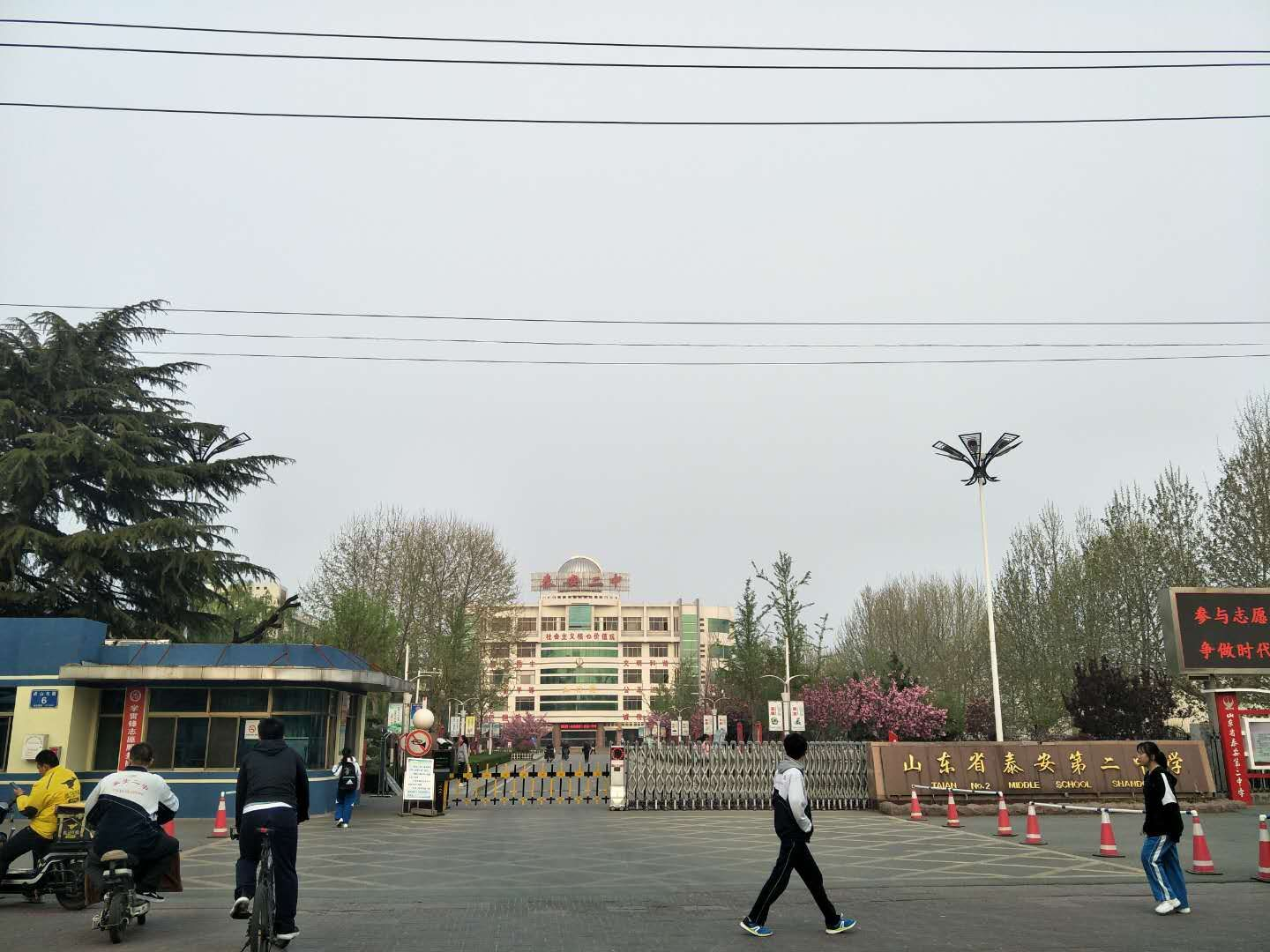 学校历史照片